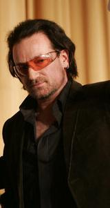 Bono